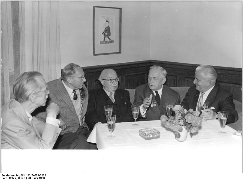 Berlin, AdK, Empfang zu Ehren Hans Marchwitza Zentralbild Kohls 28.6.1960 Berlin: Empfang zu ehren Hans Marchwitzas in der Akademie der Künste Aus Anlaß des 70. Geburtsatges des bedeutenden deutschen Arbeiterschriftstellers Hans Marchwitza fand am 28.6.1960 in der Deutschen Akademie der Künste zu Berlin ein Empfang statt. UBz: Während des Empfanges: Hans Marchwitza erzählt vlnr: Prof. Otto Nagel, Ludwig Renn, Arnold Zweig, Hans Marchwitza und Willi Bredel. Abgebildete Personen: Nagel, Otto Prof.: Maler, Präsident der Akademie der Künste (AdK), Nationalpreisträger, Vaterländischer Verdienstorden (VVO) in Gold, DDR (GND 118586300)